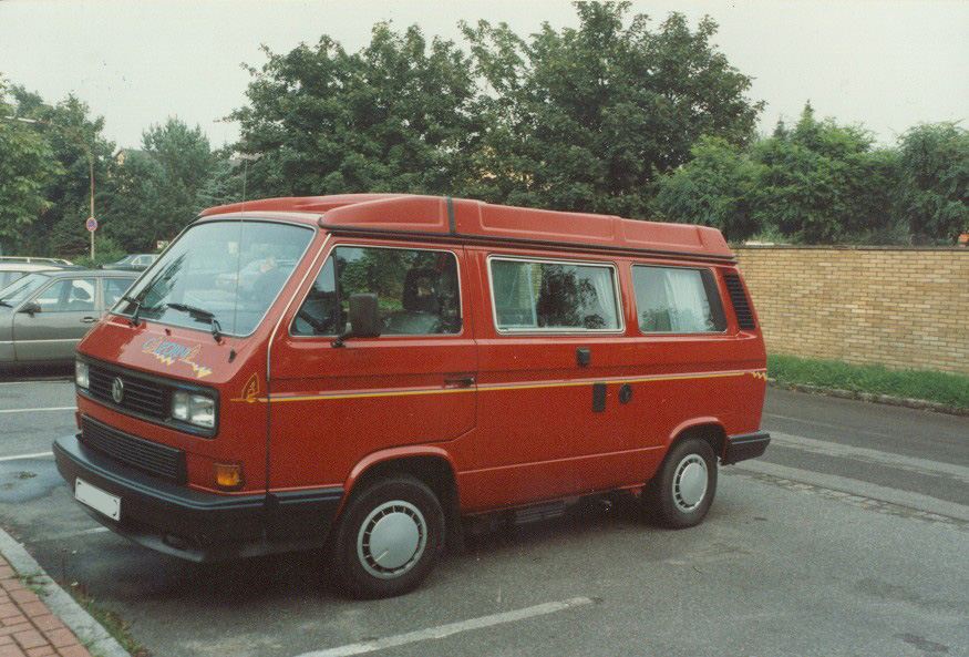 VW Bus Sondermodell "California" mit Klappdach Baujahr 1989, 3-Gang-Automatikgetriebe, Motor 2,1l Benziner